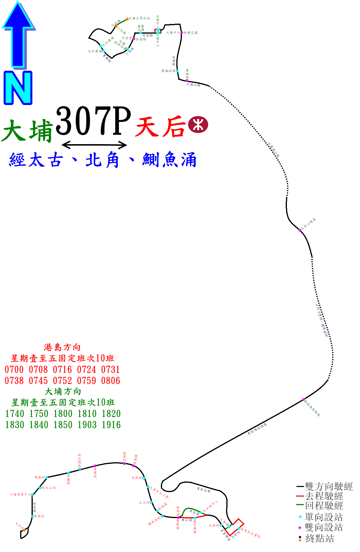 中文（香港）: 過海隧巴307P線的走線圖